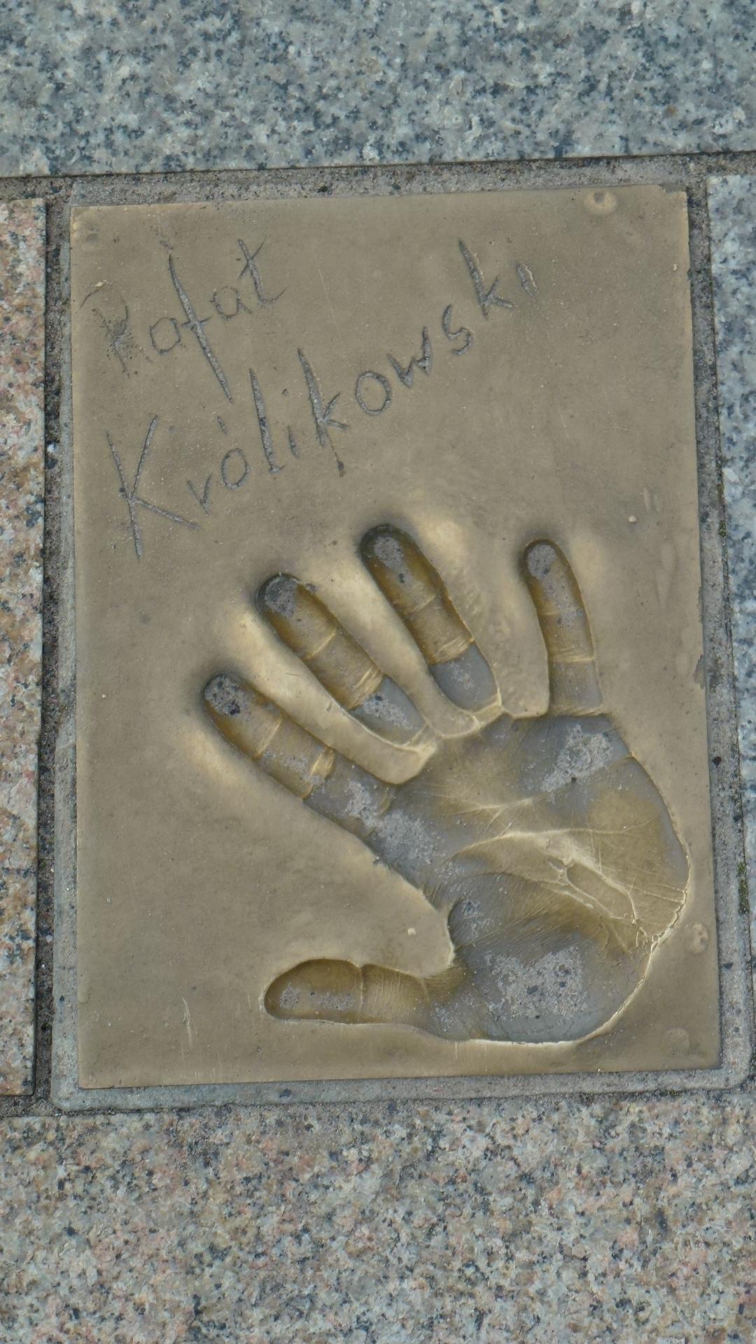 Odcisk dłoni aktora (gwiazdy) na ul. Alei Gwiazd w Międzyzdrojach woj. zachodniopomorskie pow. kamieński.